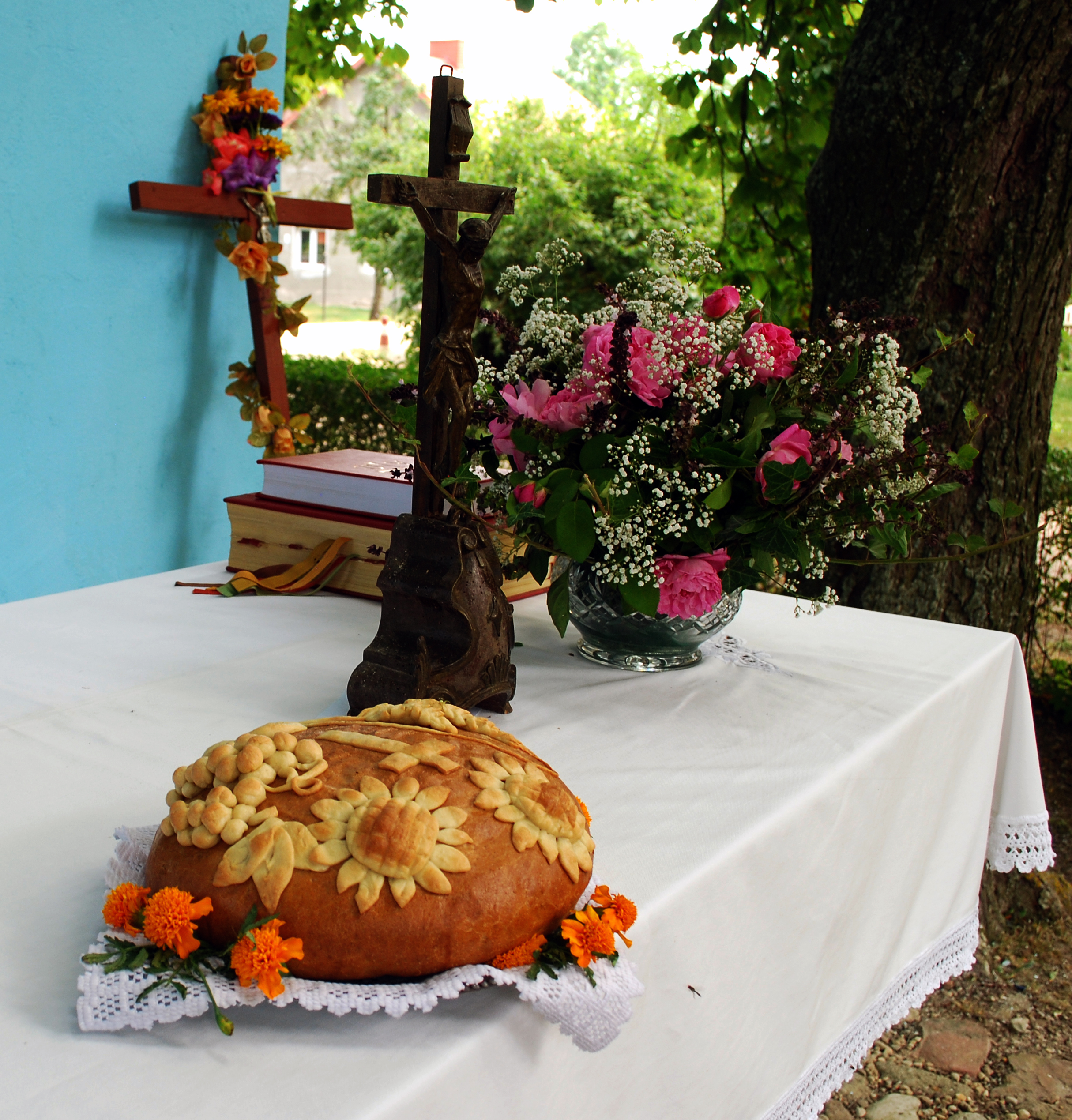 Pielgrzymka do kapliczki Matki Boskiej Częstochowskiej w Nowej Wsi Reszelskiej - Chlebek reszelski na ołtarzu.